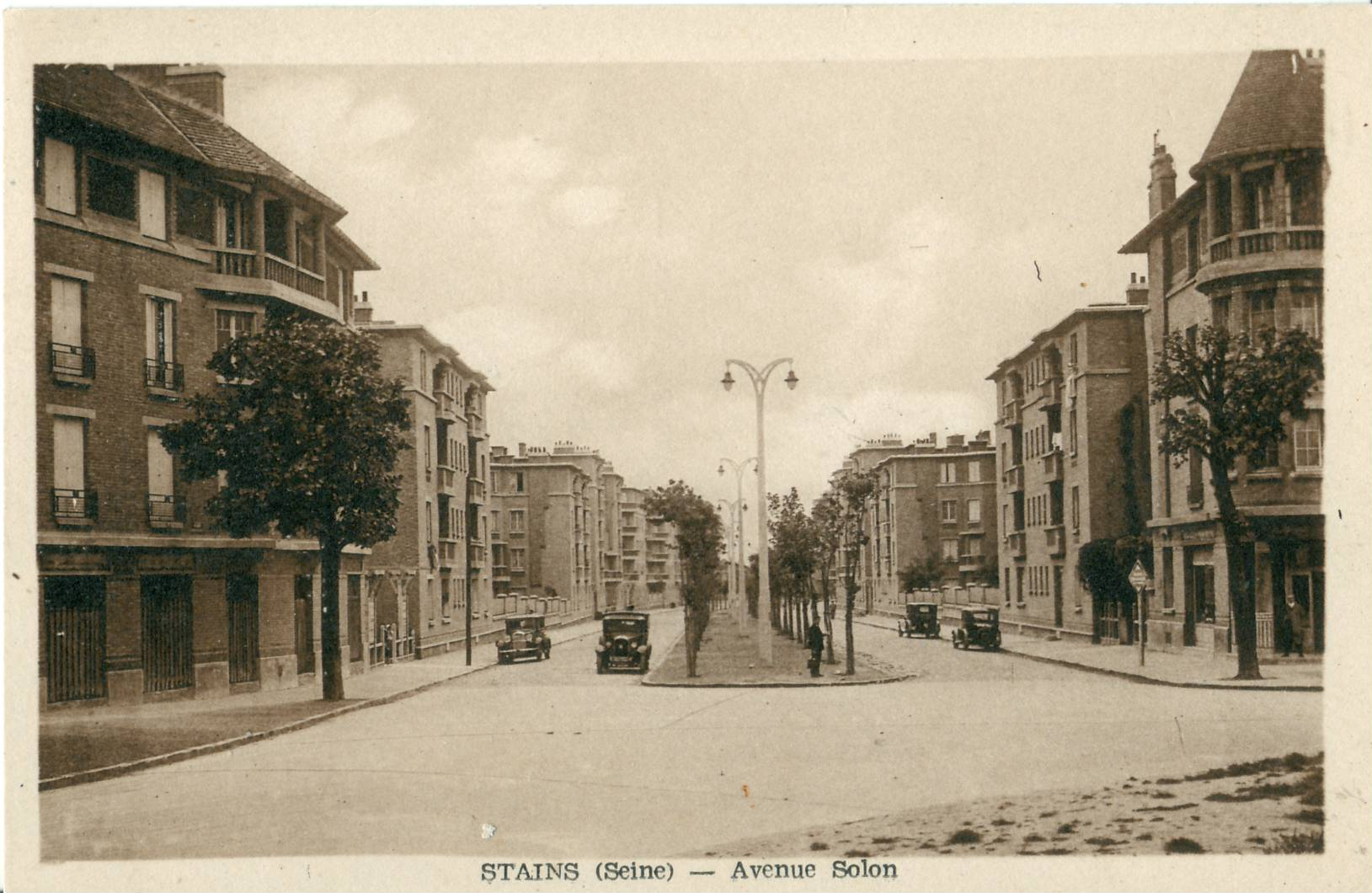 Carte postale ancienne, éditée par Davoust : la Cité Jardin de Stains